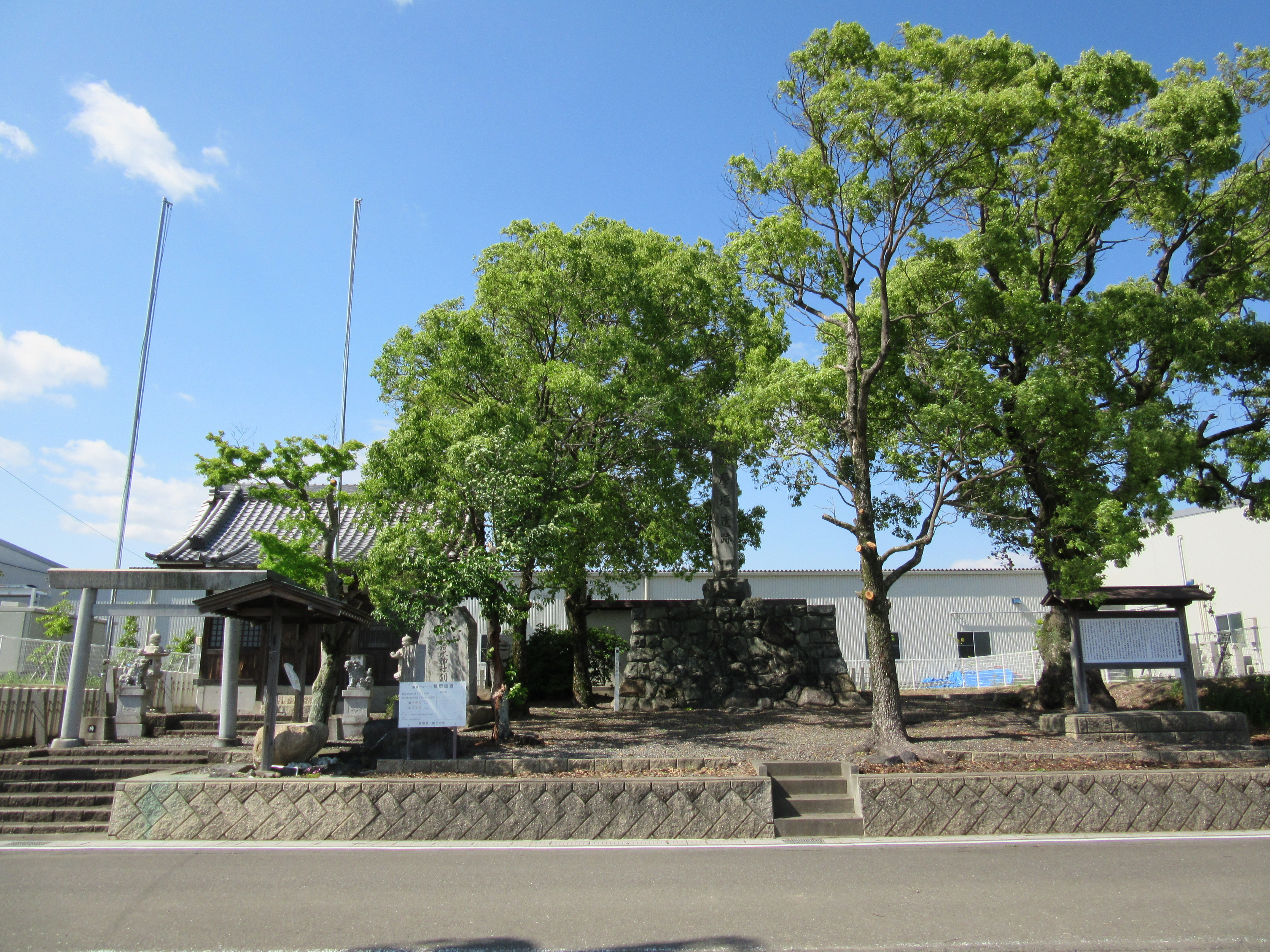 大榑川洗堰跡と薩摩堰治水神社